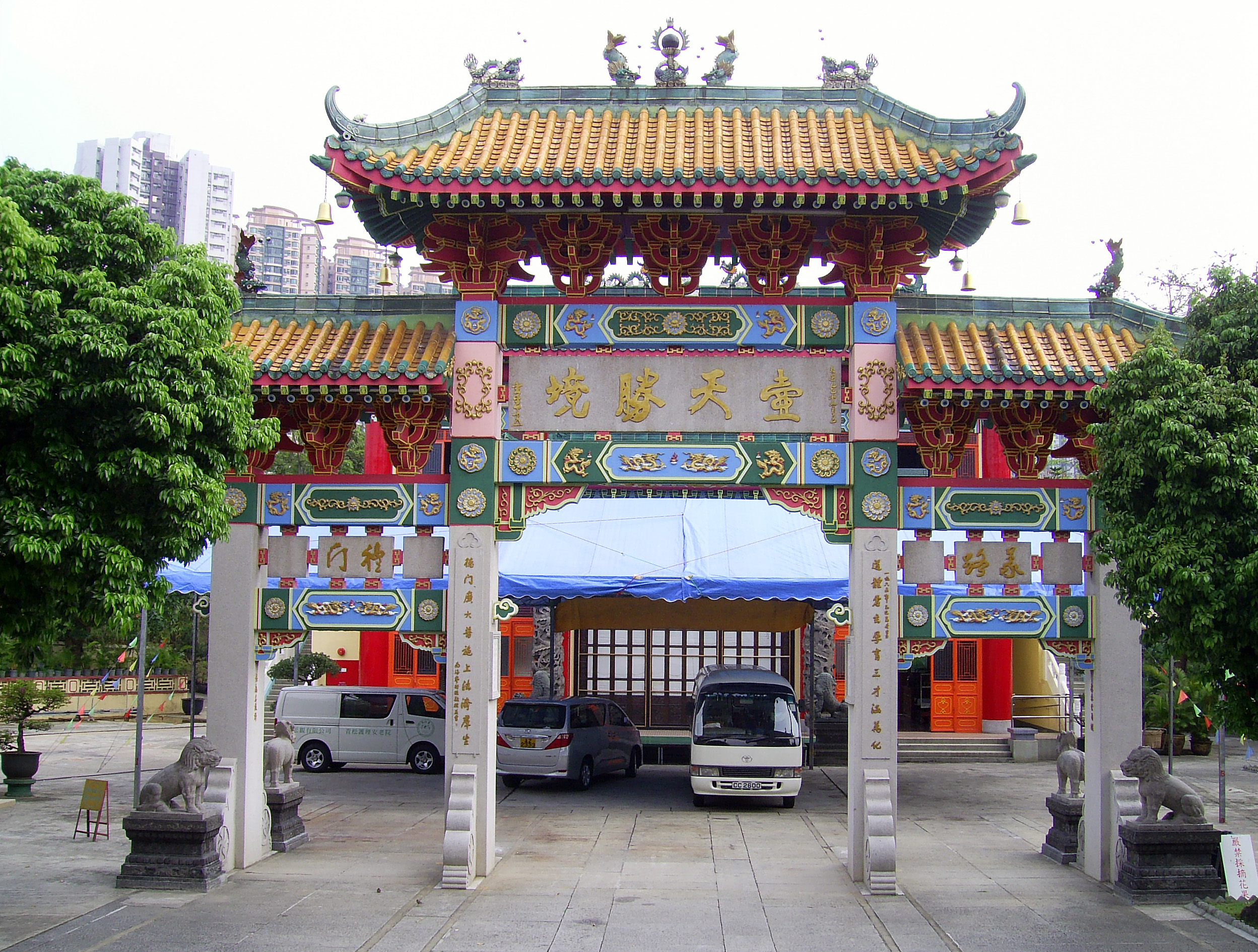 中文（香港）: 青松觀壺天勝境牌坊